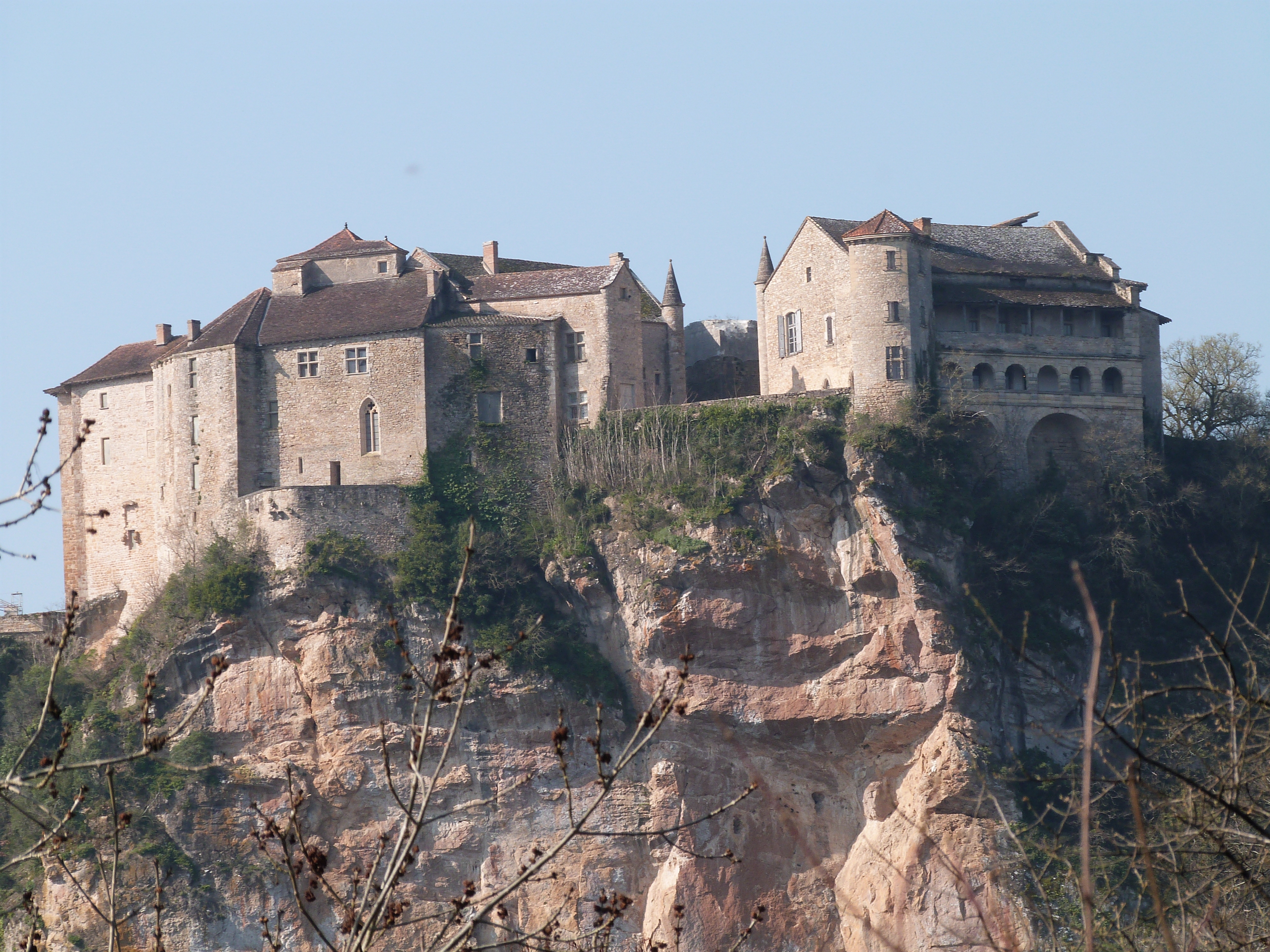 Châteaux de Bruniquel